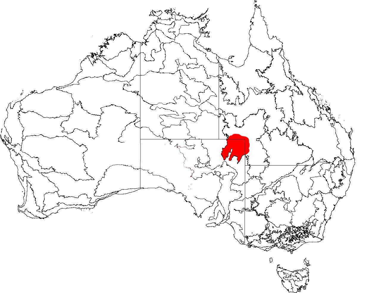 Пустиња Стерт Стоуни